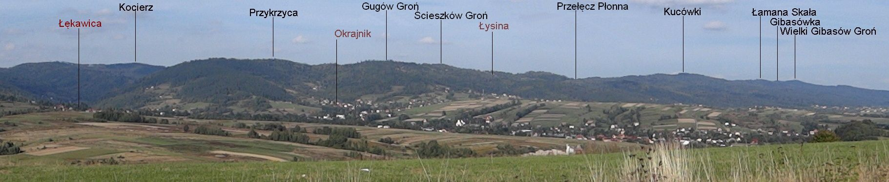 Pasmo Łysiny, widok z południowego zachodu